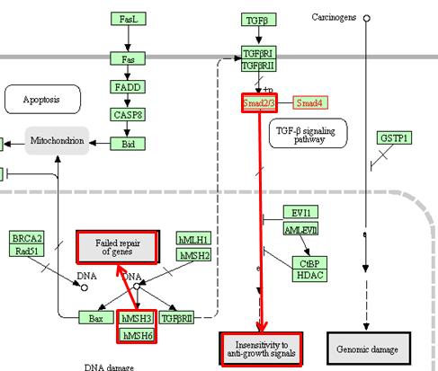 Ruta SMAD y MSH relacionada con el cáncer.